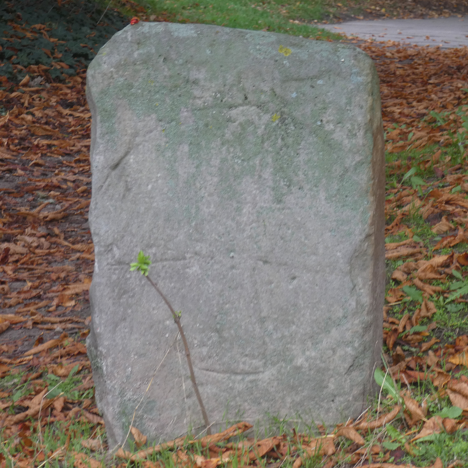 Die Kreuzsteine, oder früher die 5 Steine, sind eine Gruppe von Kreuzsteinen in Hiddestorf, einem Stadtteil von Hemmingen in der Region Hannover in Niedersachsen